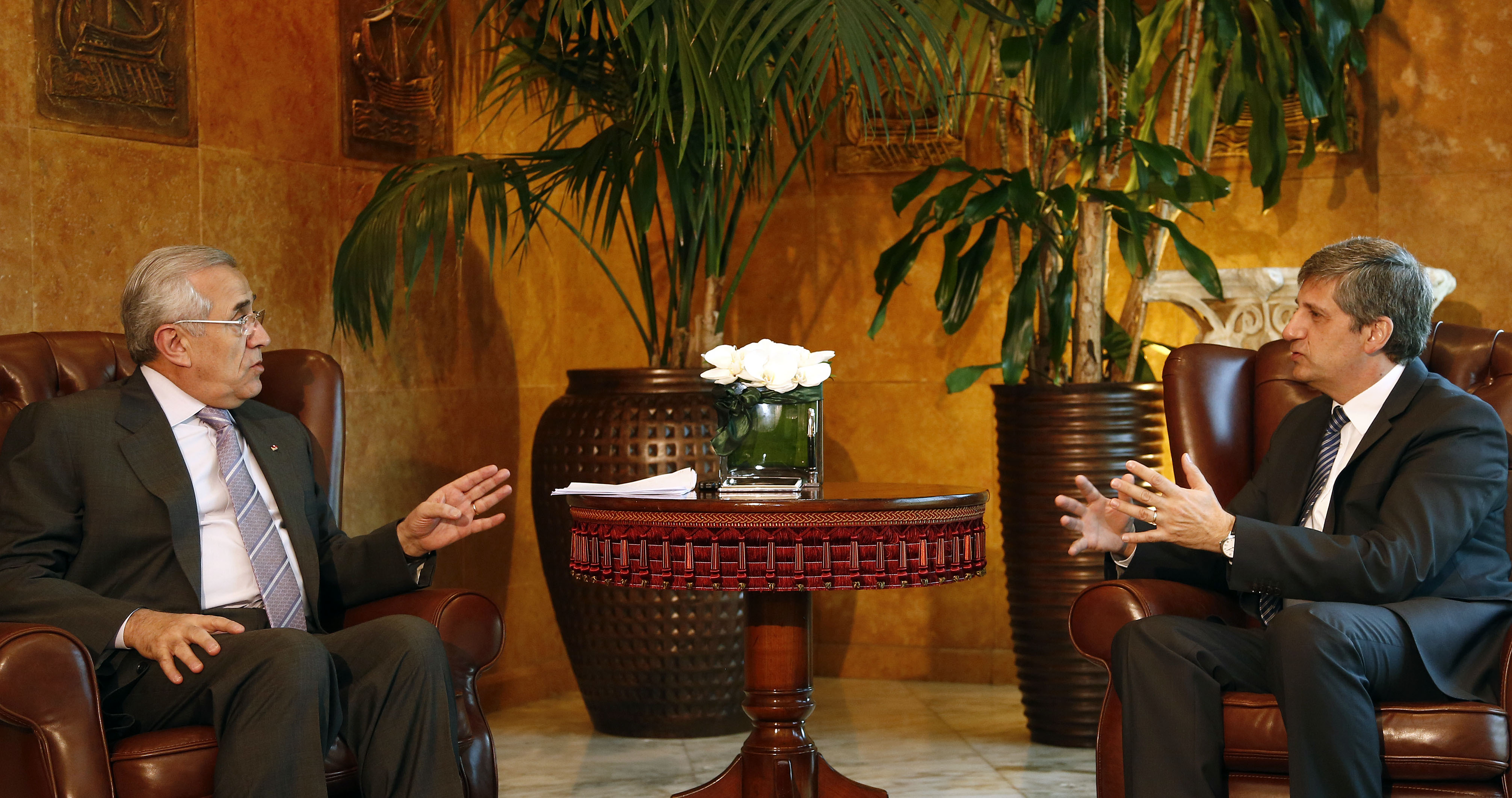 Arbeitsbesuch Libanon, Vizekanzler Michael Spindelegger trifft im Rahmen seiner Nahost-Reise den libanesischen Präsidenten Michel Sleiman in Beirut. 13.04.2013, Foto: Dragan Tatic